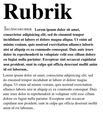 Exempel på ingångsrubrik